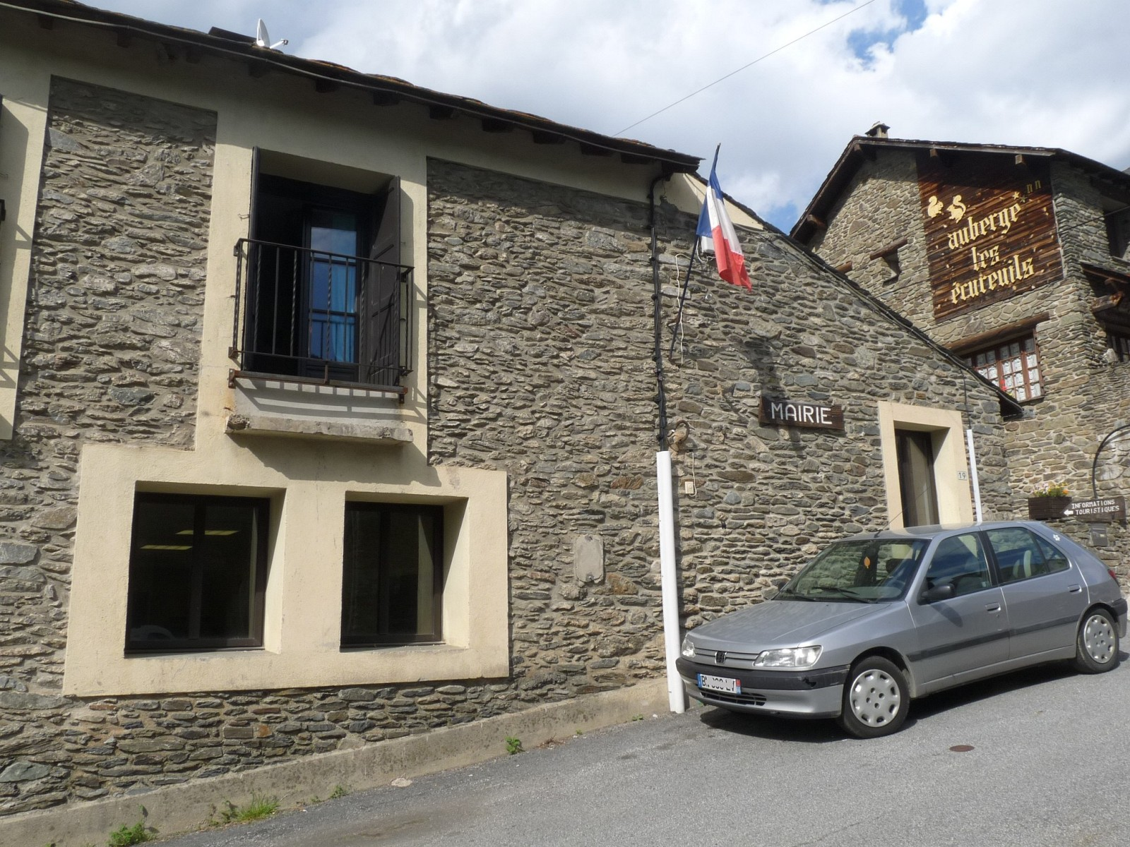 Mairie de Valcebollère, Pyrénées-Orientales, France